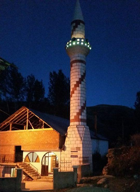 Erzurum'un İspir ilçesinde bulunan Bayındır Köyü'nün Camisi